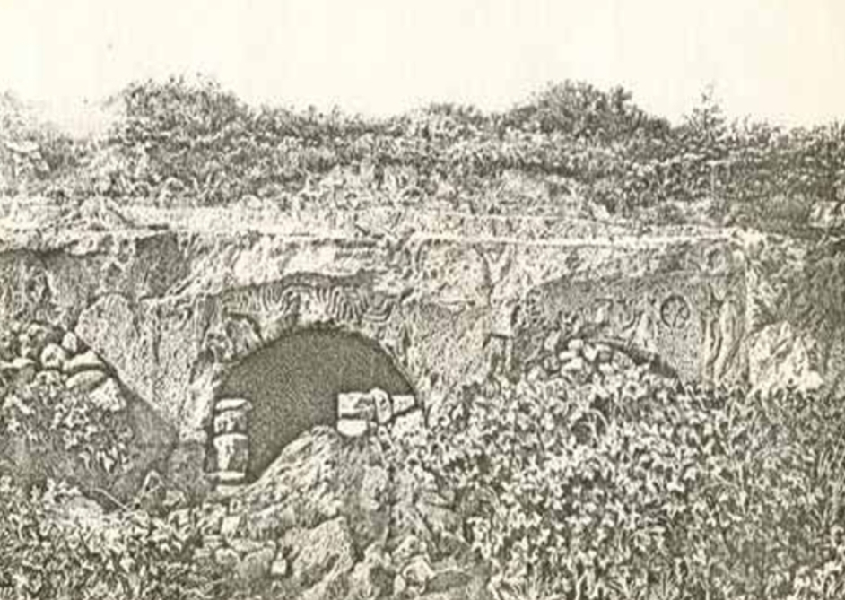 קבר 1882